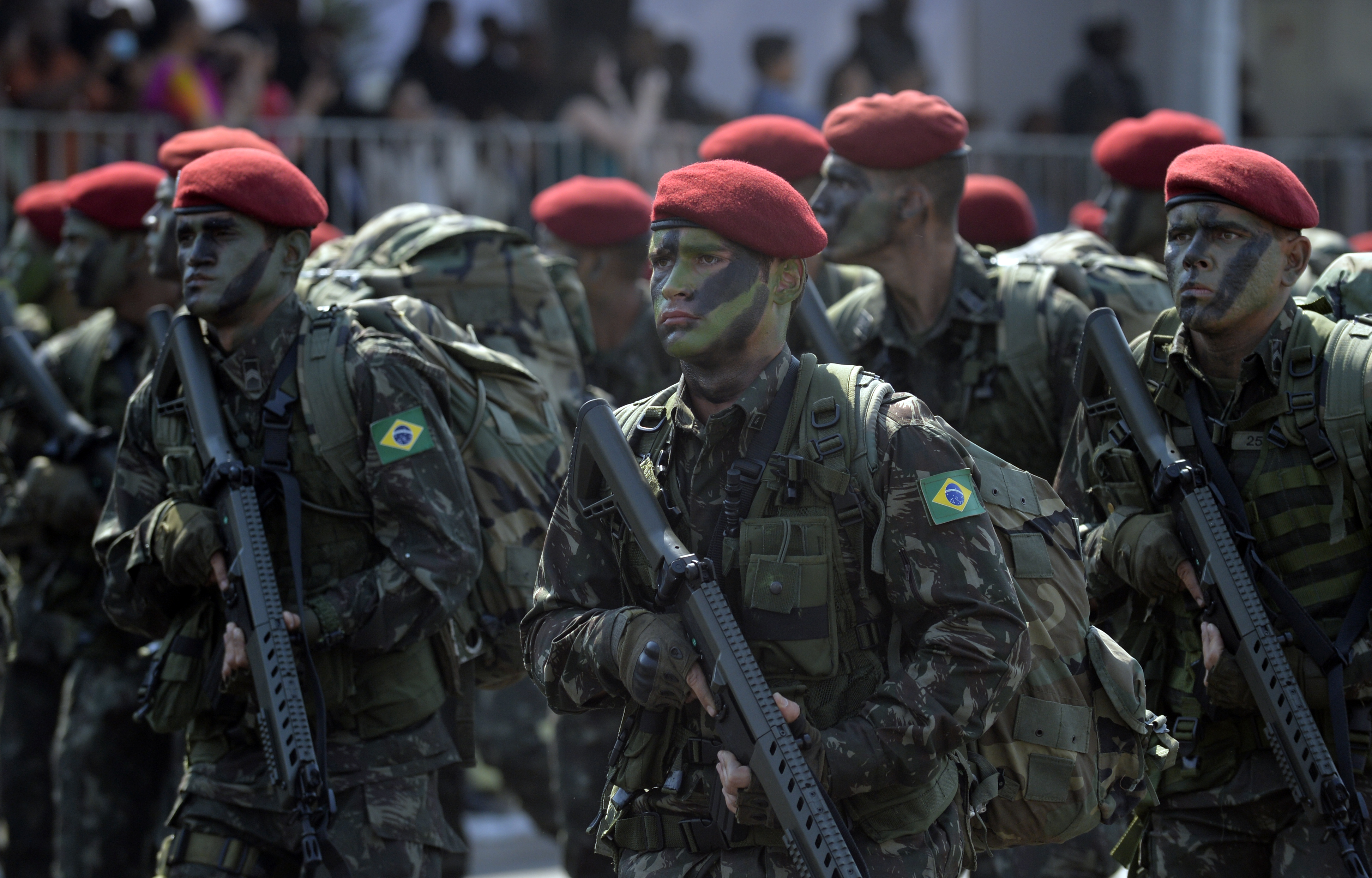 07/09/2015, Brasília - DF Fotos: Gilberto Alves